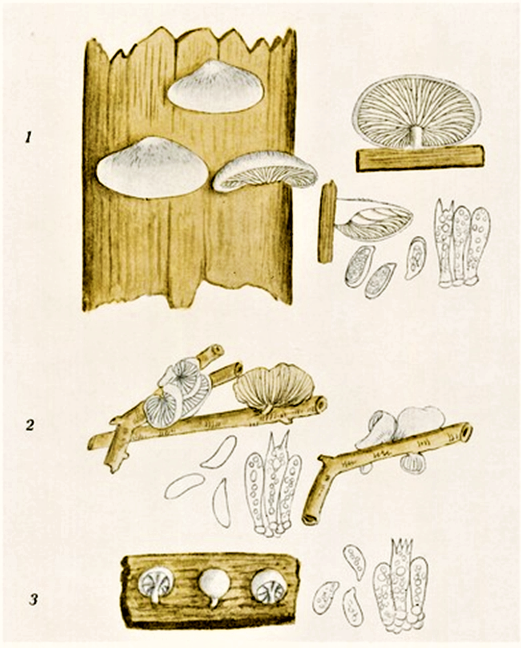 Giacomo Bresadola: 1. Pleurotus pinsitus Fr.; 2. Pleurotus variabilis Pers.; 3. Pleurotus perpusillus Fr.